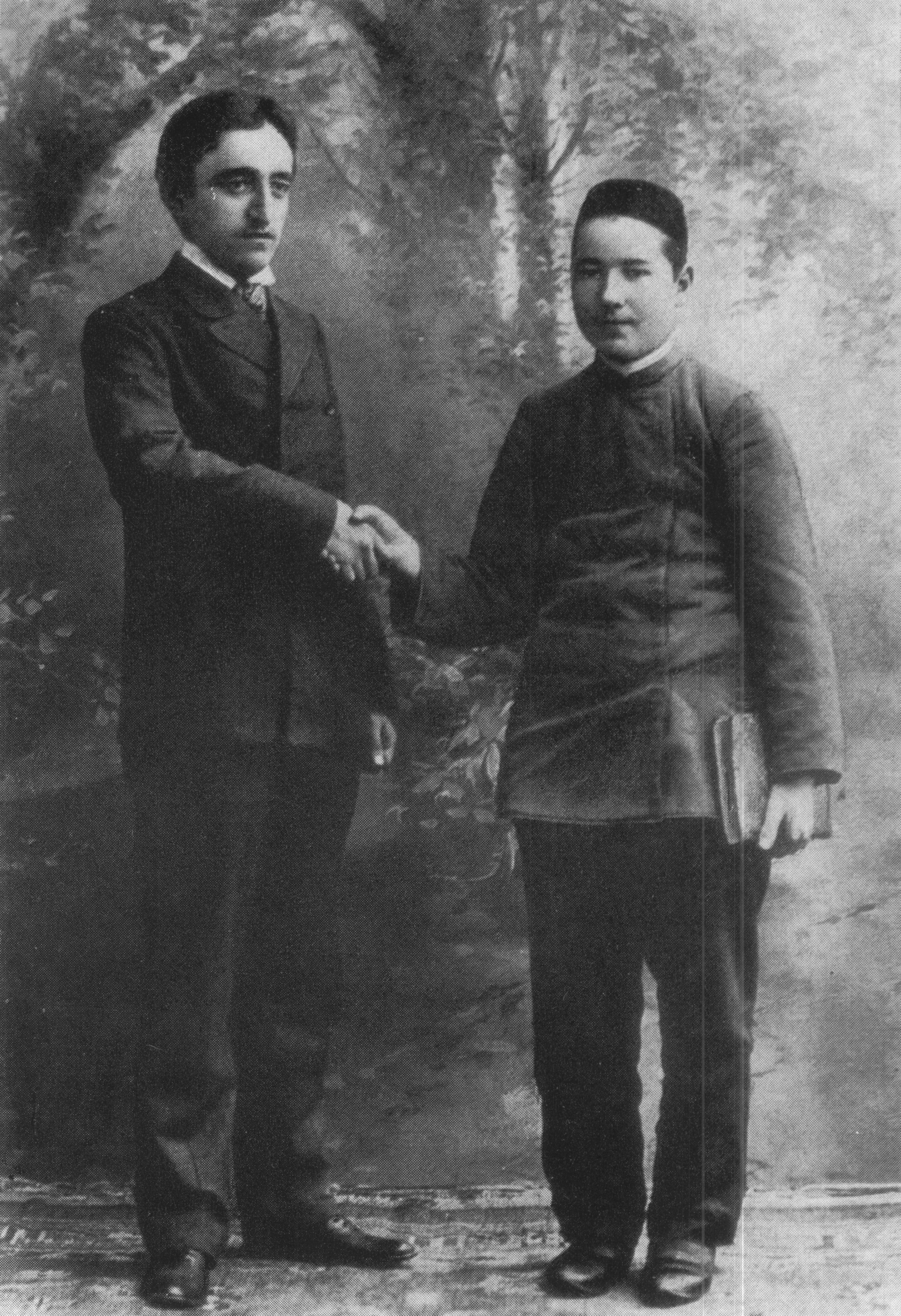 Ğabdulla Tuqay 1905-06